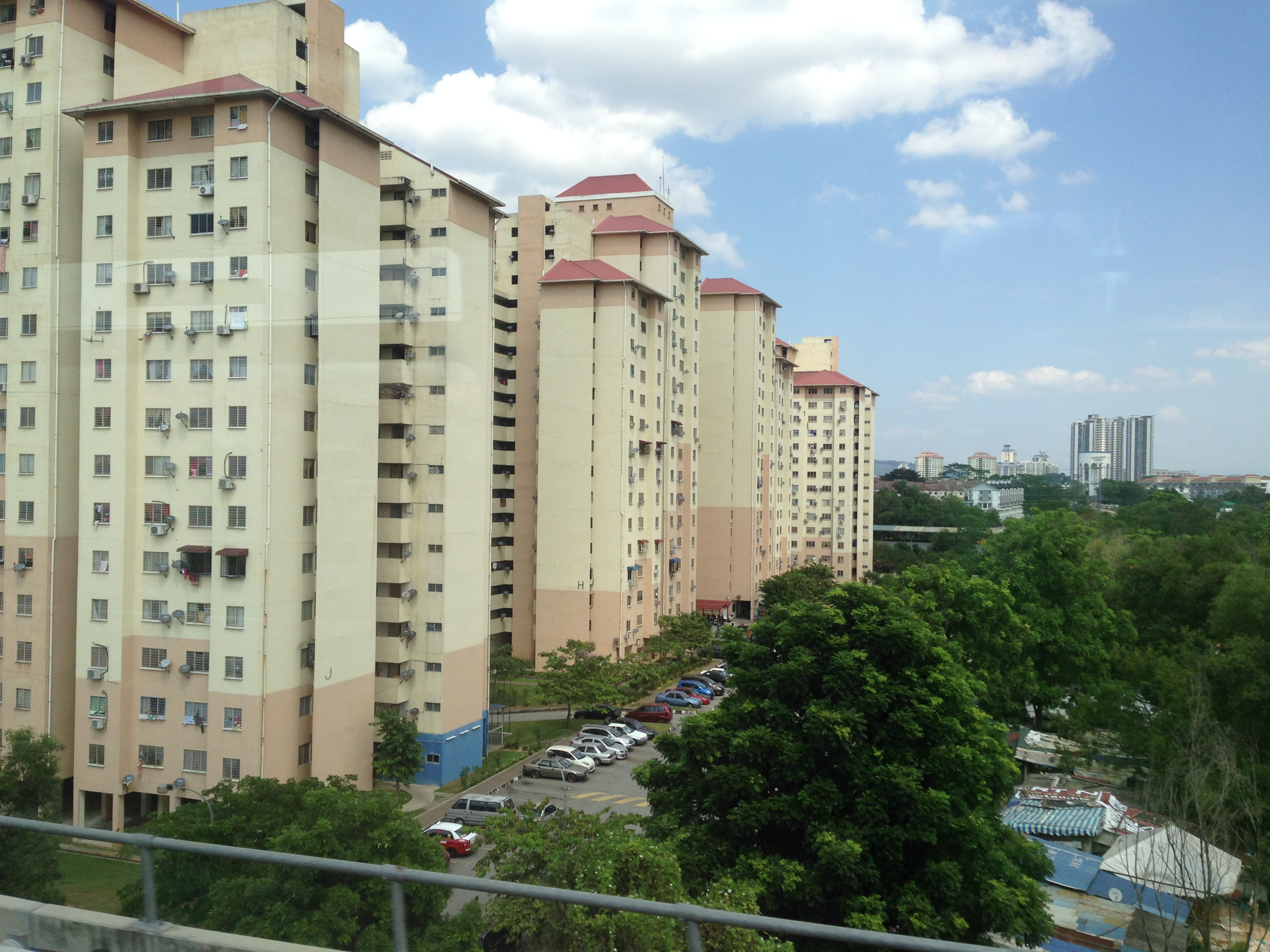 People"s Housing Project (Program Perumahan Rakyat or PPR) low cost high rise flats developed by the National Housing Department (Jabatan Perumahan Negara or JPN) in Kuala Lumpur since the 1998.